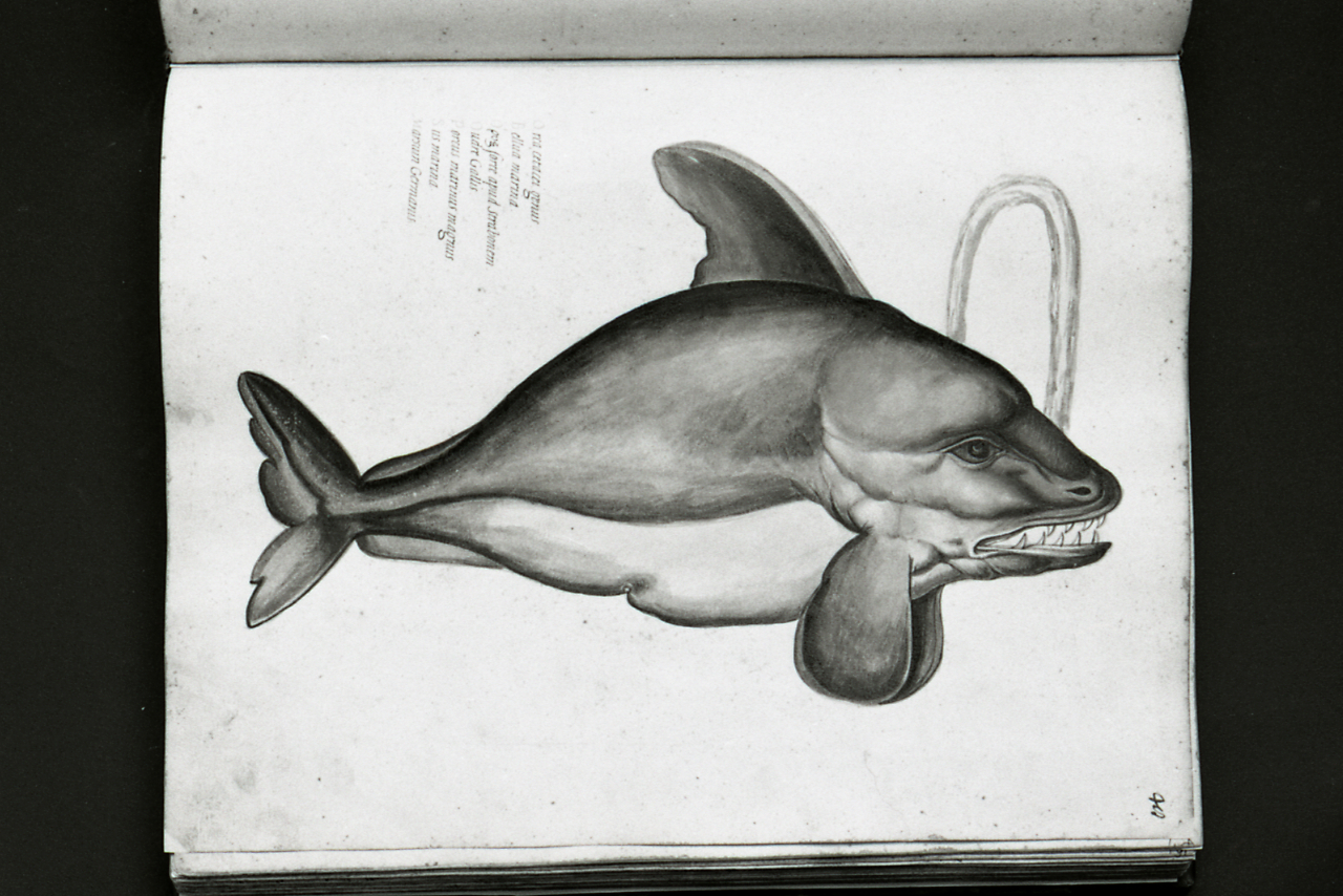 Servizio fotografico : Bologna, 1974 / Paolo Monti. - Strisce: 7, Fotogrammi complessivi: 37 : Negativo b/n, gelatina bromuro d'argento/ pellicola ; 35 mm. - ((Sul portanegativi: N[I]K[MA]T FP4. - Occasione: Pubblicazione. - Fonte: Agenda di Paolo Monti: Leica 1501-3000 Controllo numerazione (1950-1978), presso Archivio Paolo Monti. - Fonte: Monografia di Università degli studi [Bologna]: Rassegna storica dell'insediamento: catalogo ragionato delle realizzazioni edilizie universitarie in rapporto all'assetto urbano, Bologna, Tip. Labati e Nanni (1974). - Fonte: Fattura di Paolo Monti: IV. Commesse/ Fattura n. 20 (1974/10/21), presso Archivio Paolo Monti